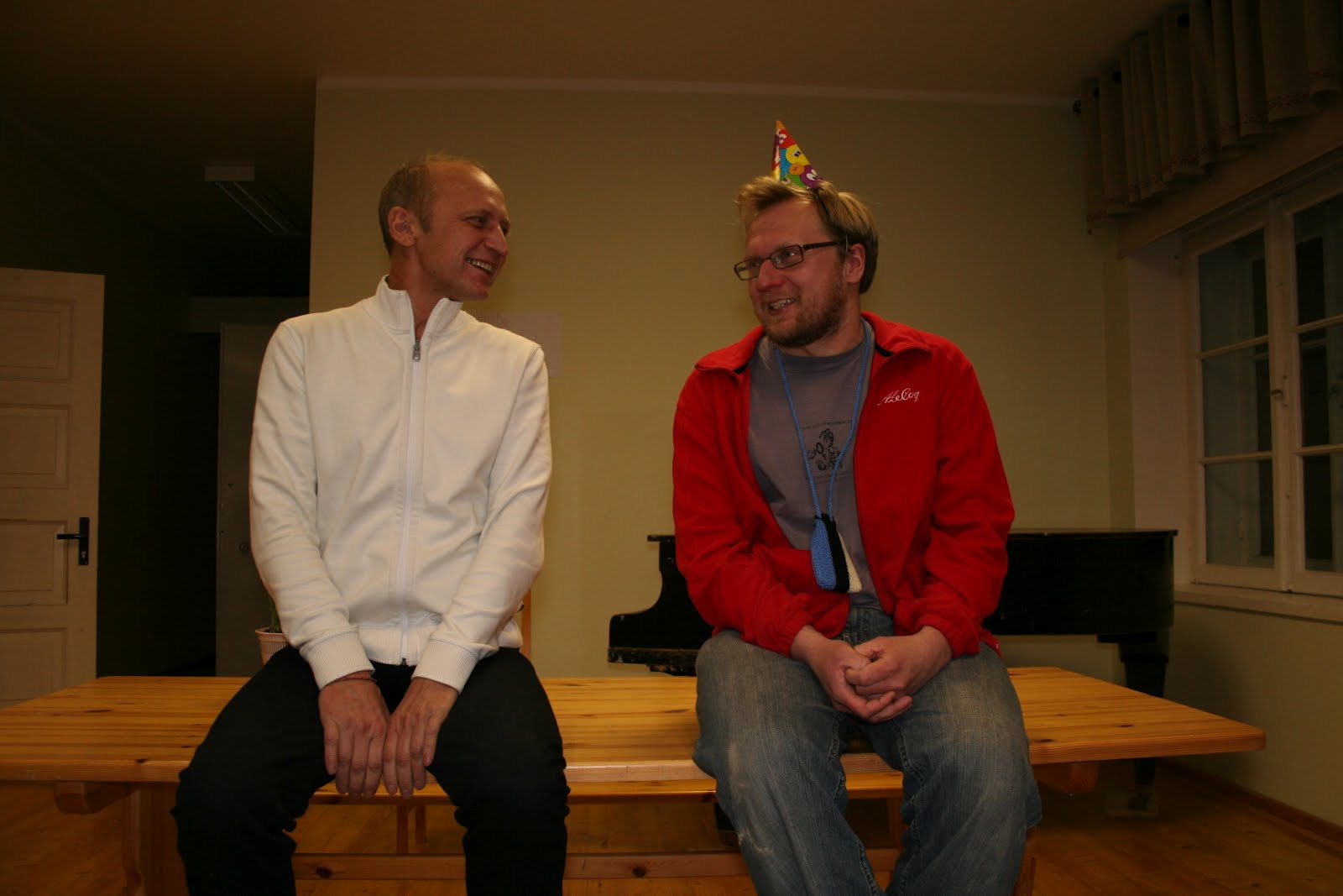 Vahur Kersna ja Contra. Urvaste. Contra sünnipäev.